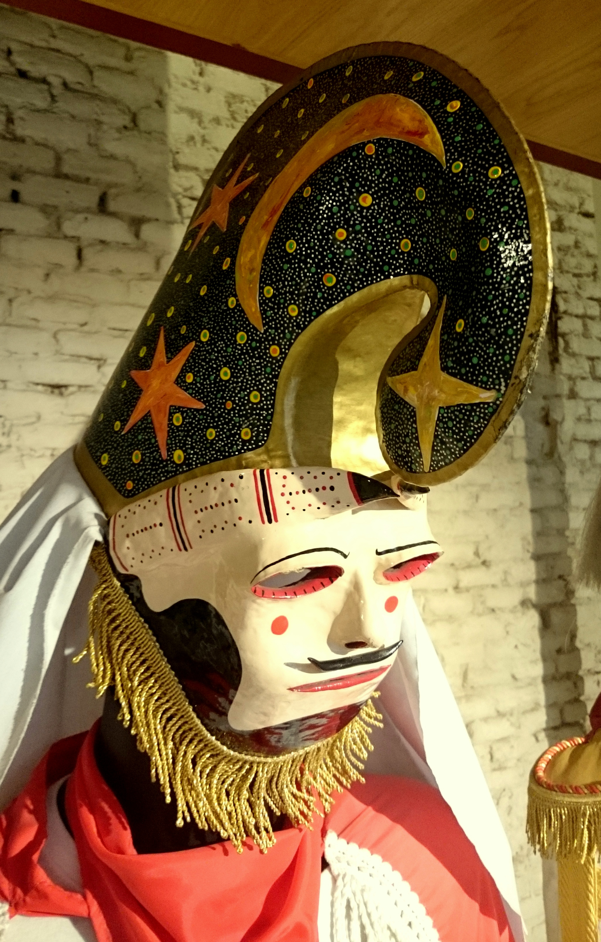 Máscara de pantalla del carnaval de Xinzo de Limia (Ourense) en el Museo de Artes y Tradiciones Populares de Madrid This is a photography of a Folklore festival in Spain (Wikidata id Q20541714).